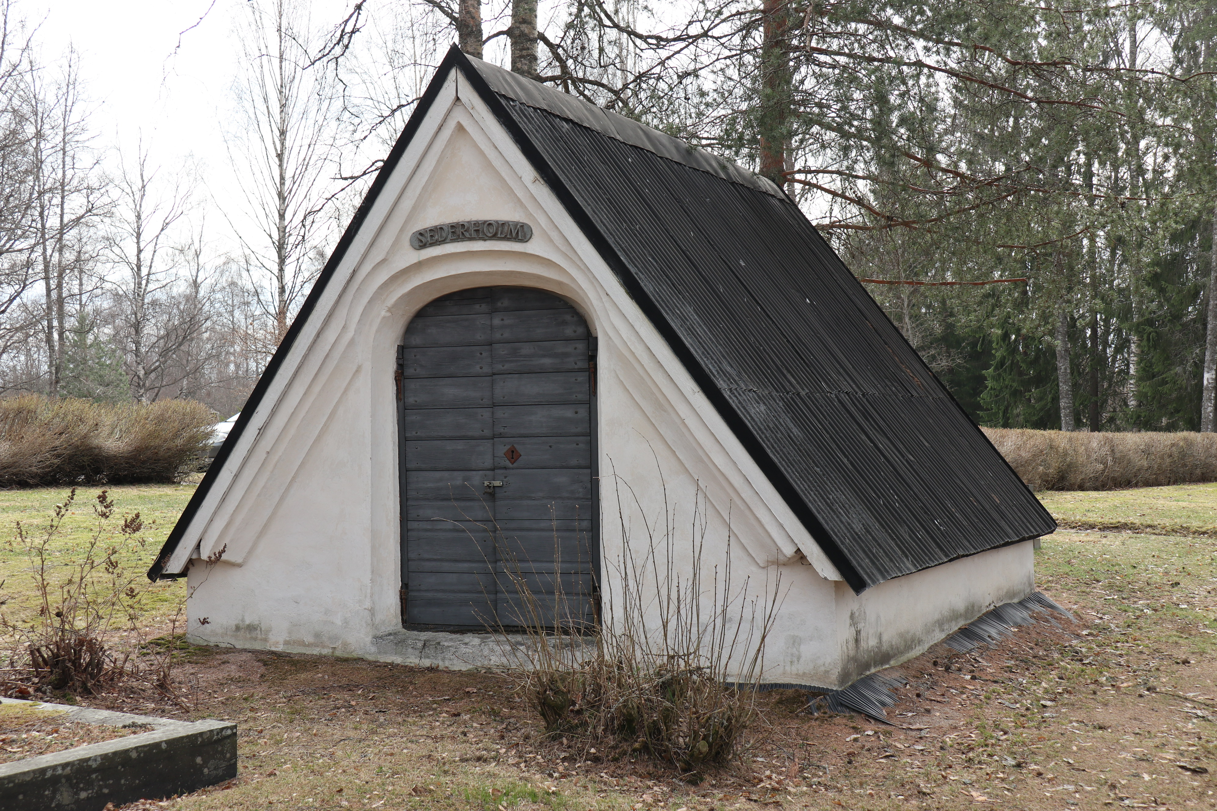 Sederholmien hautakappeli Mäntsälän hautausmaalla. Kappeli oli käytössä 1842-1878 ja sinne on haudattu kymmenen suvun jäsentä. Ensimmäinen kappeliin haudattu oli Saaren kartanon Carl Albrecht Sederholm (1765-1842). Lähde: Blåfield, Martti & Hyvönen, Heikki & Knapas, Marja Terttu: Gloria In Excelsis Deo – Mäntsälän kirkon historiaa. Mäntsälän seurakunta, 1991. Sivu 33. ISBN 952-90-3537-3.